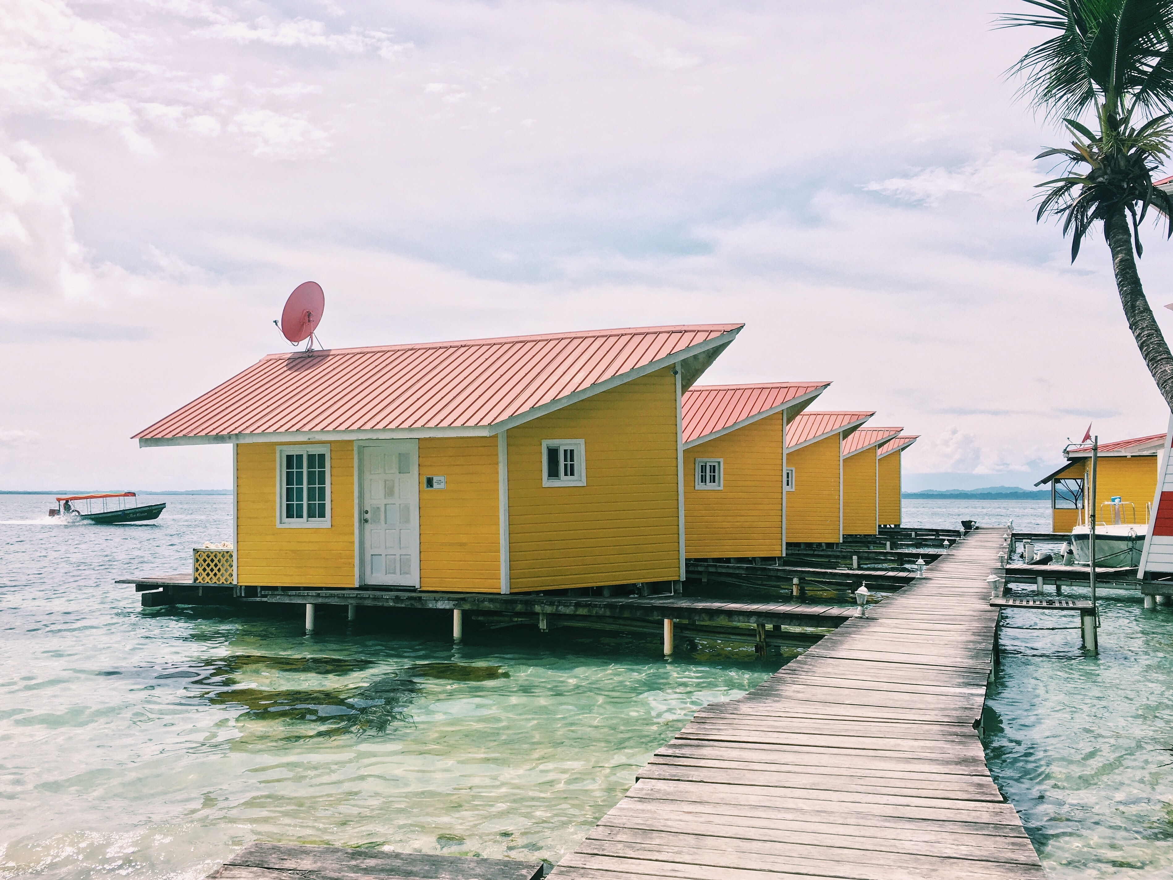 Casa em Bocas del Toro, Panamá